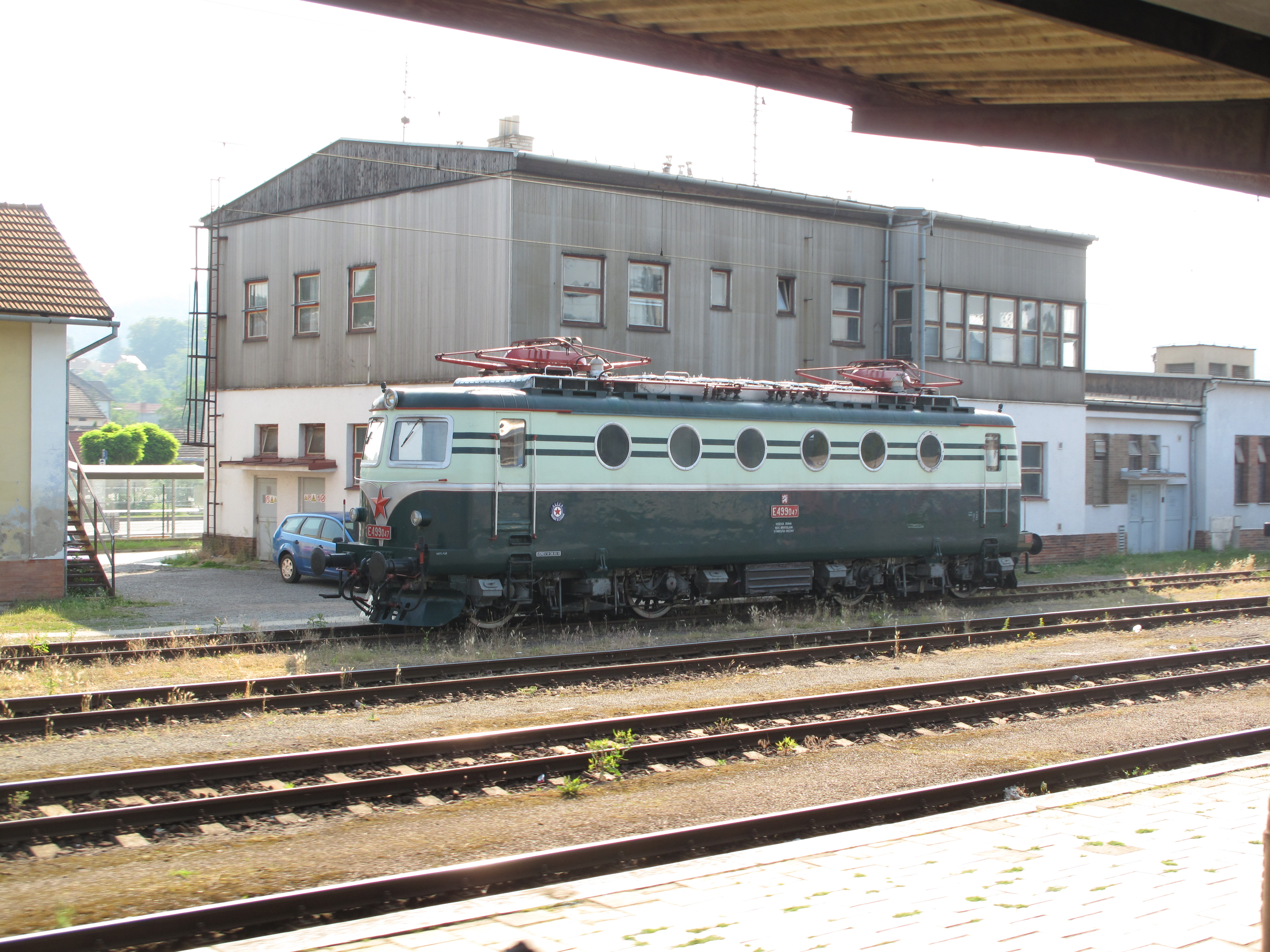 Lokomotiva E499.047 v Tišnově